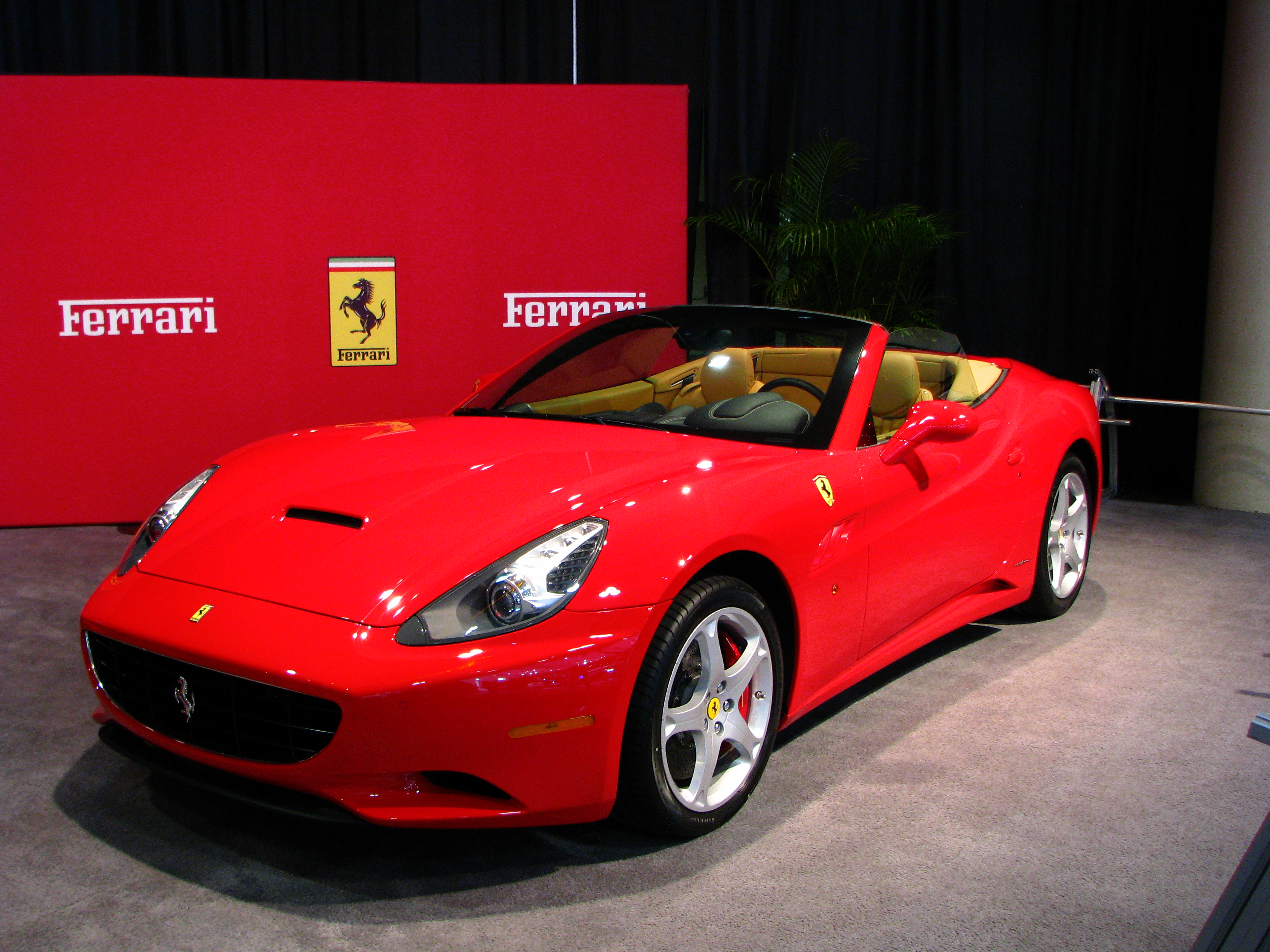 Ferrari California